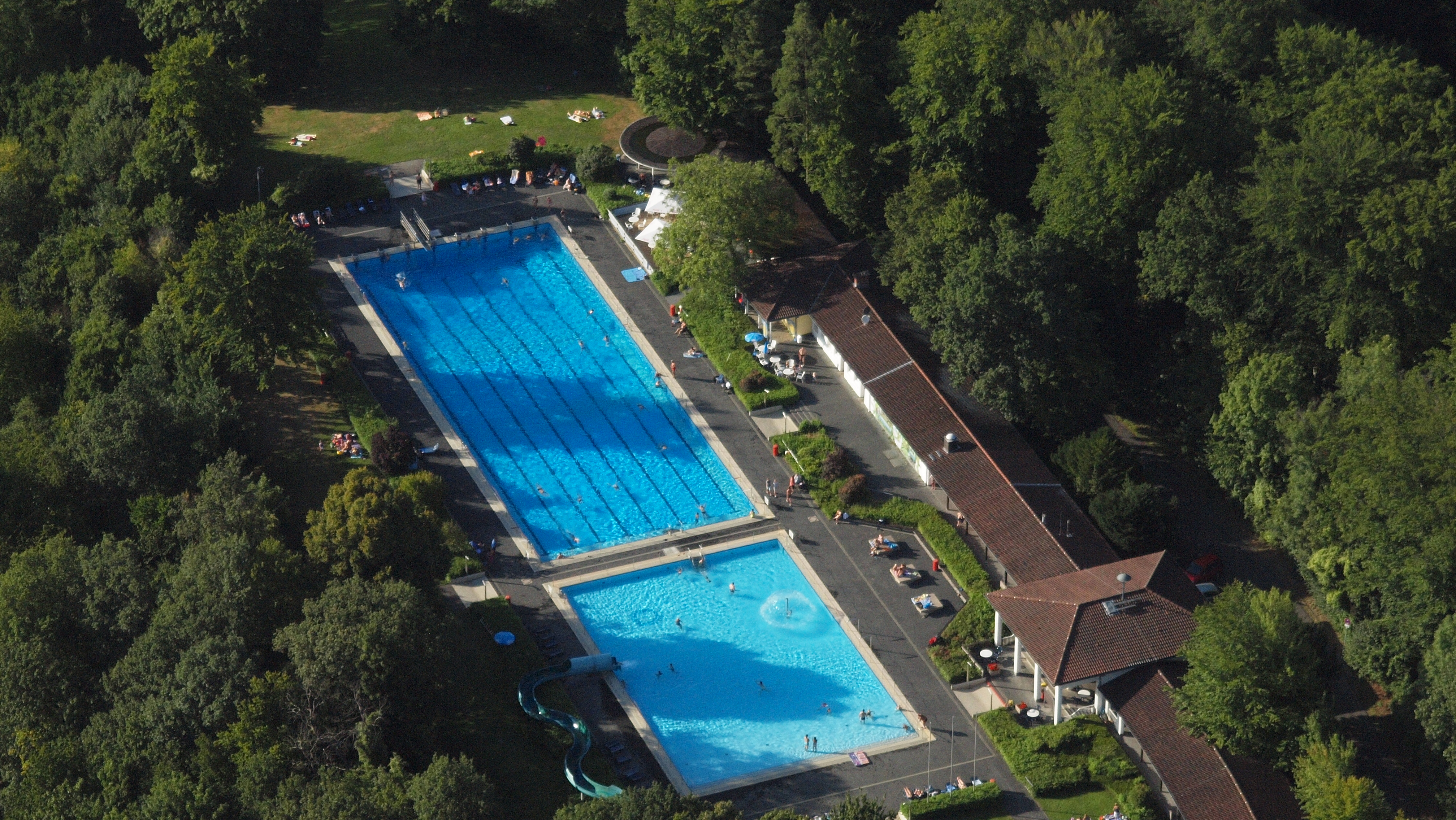 Lemmerz-Freibad, Oberweingartenweg 1, Königswinter